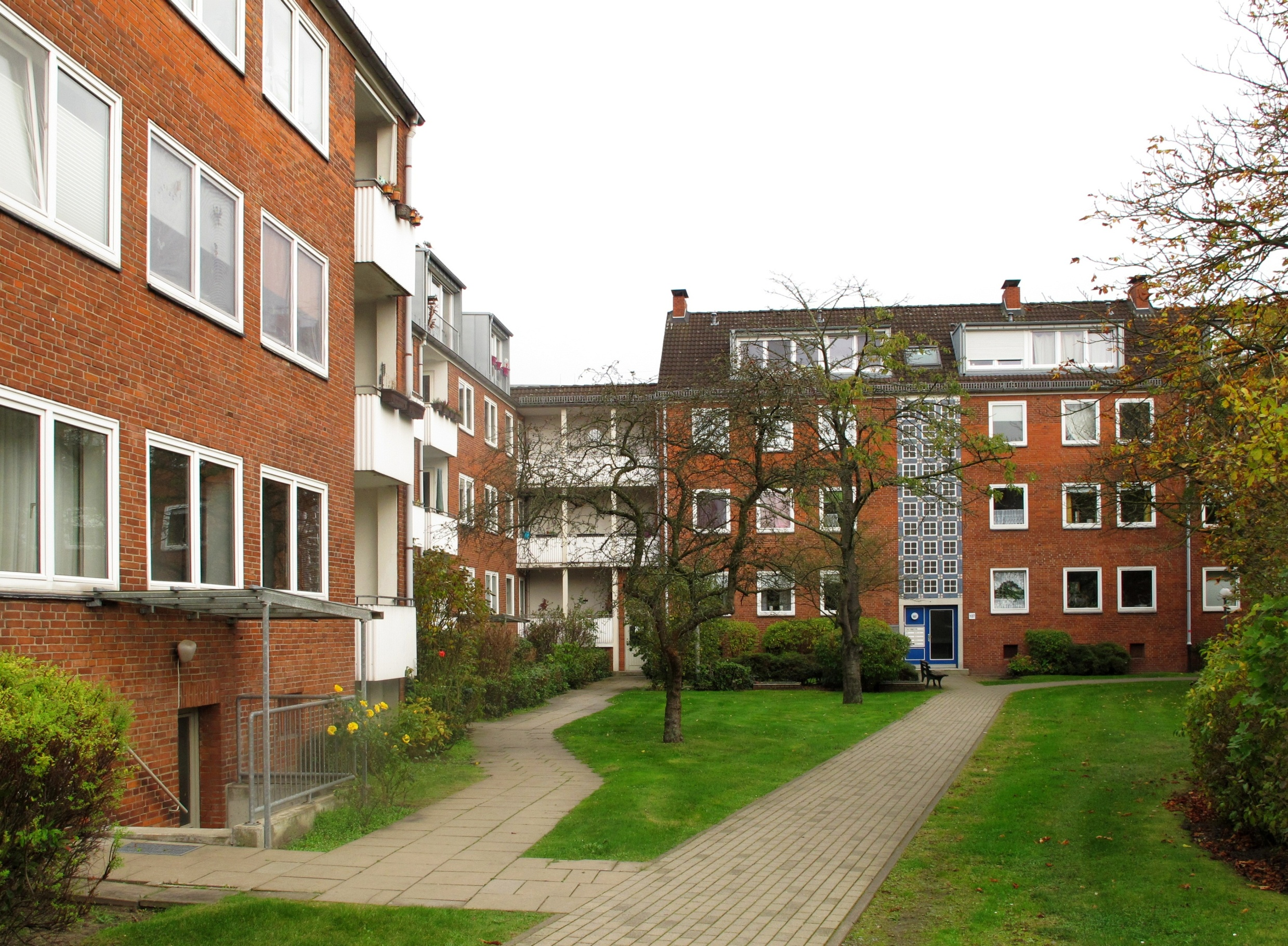 Wohnbauanlage Sparer-Dank (Anlage 1, Mittlerer Wohnhof), Bremen im Oktober 2014; Stadtteil: Schwachhausen; Ortsteil: Neu-Schwachhausen; Baujahr: 1961-1966; Architekten: Gerhard Müller-Menckens, Friedrich Heuer und Gunter Müller (alle Bremen)